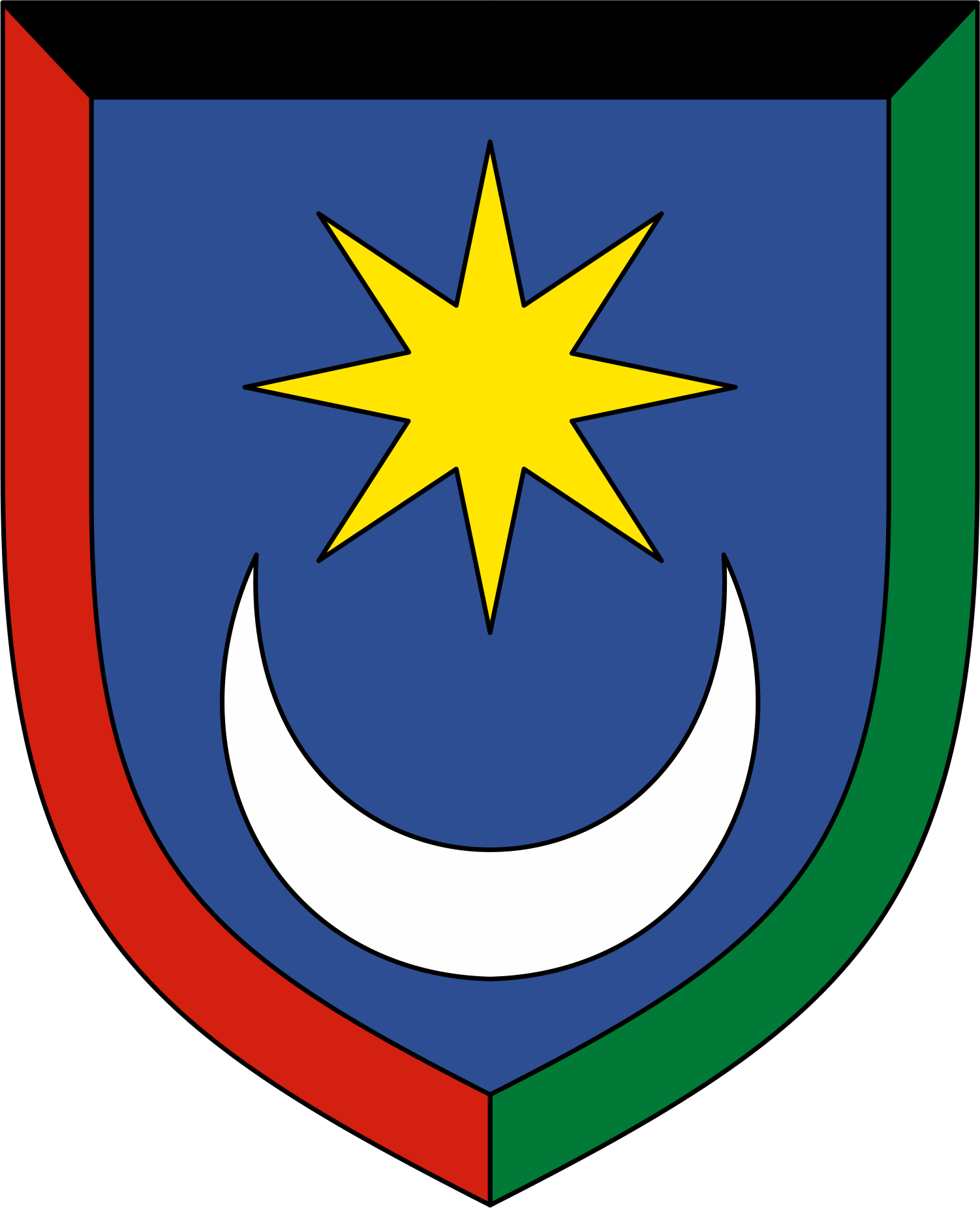 Misia sui iuris v Afganistane